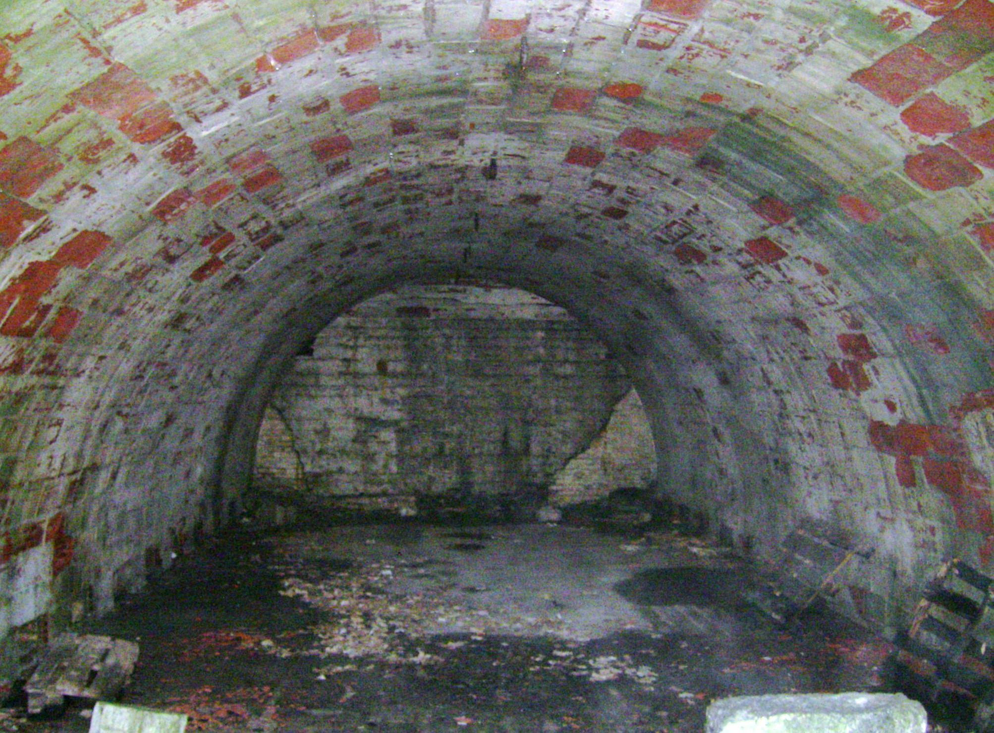 La chambre centrale de l'abris caverne de la carrière, annexe du fort de Planoise à Besançon (Doubs, France).